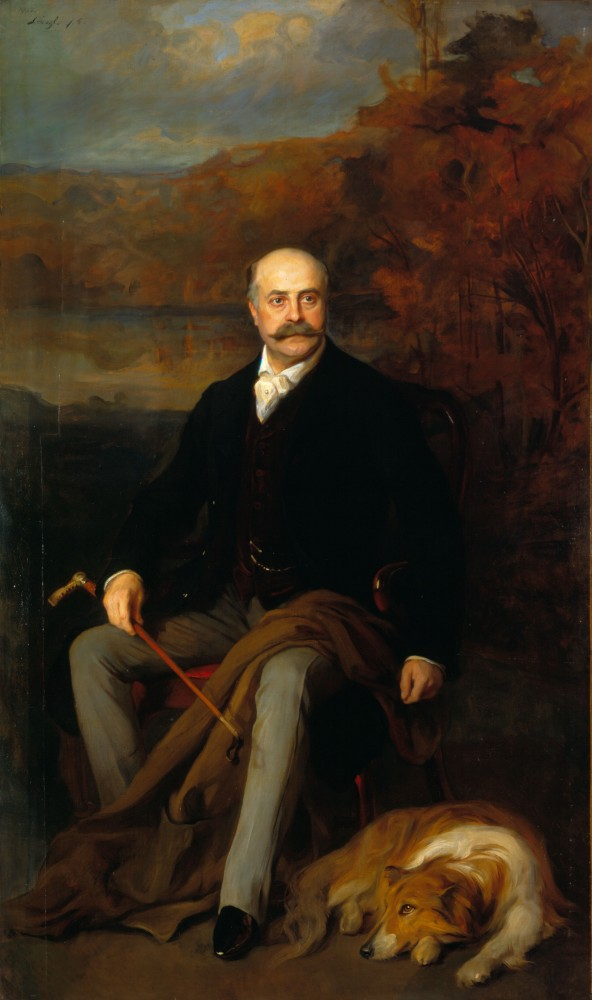 Agénor de Gramont duc de Gramont (11e) (Antoine Alfred Agénor de Gramont) (Antoine XI de Gramont) Né le 22 septembre 1851 - Paris I, 75 Décédé le 30 janvier 1925 - Paris VIII, 75